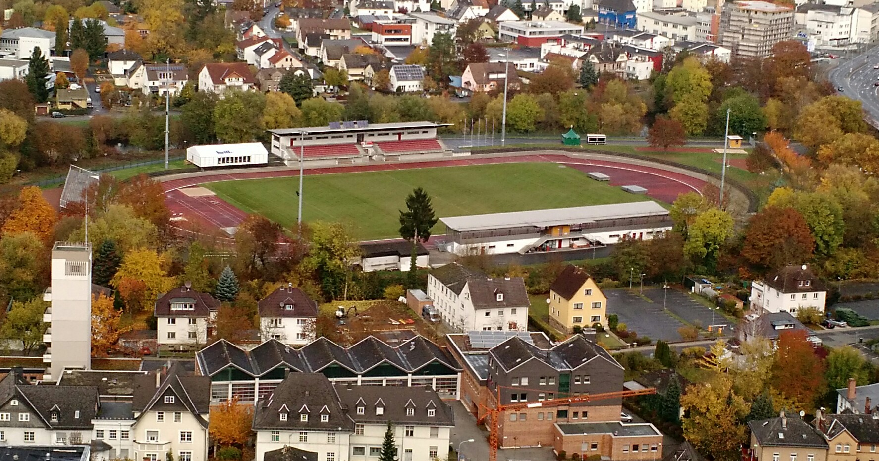 Stadion Wetzlar vom Kalsmunt aus gesehen